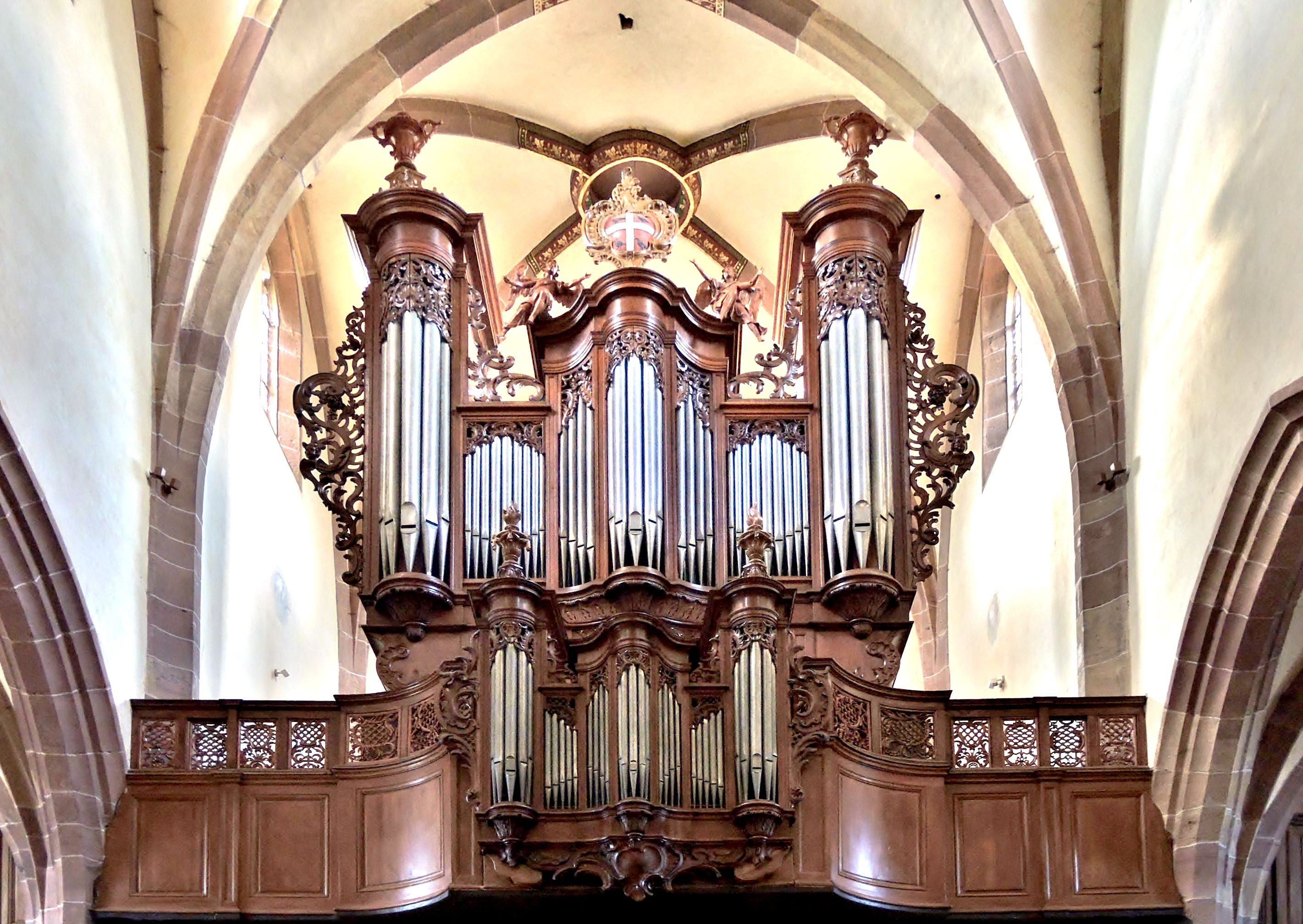 Orgue Silbermann, de l'église de Soultz Haut-Rhin